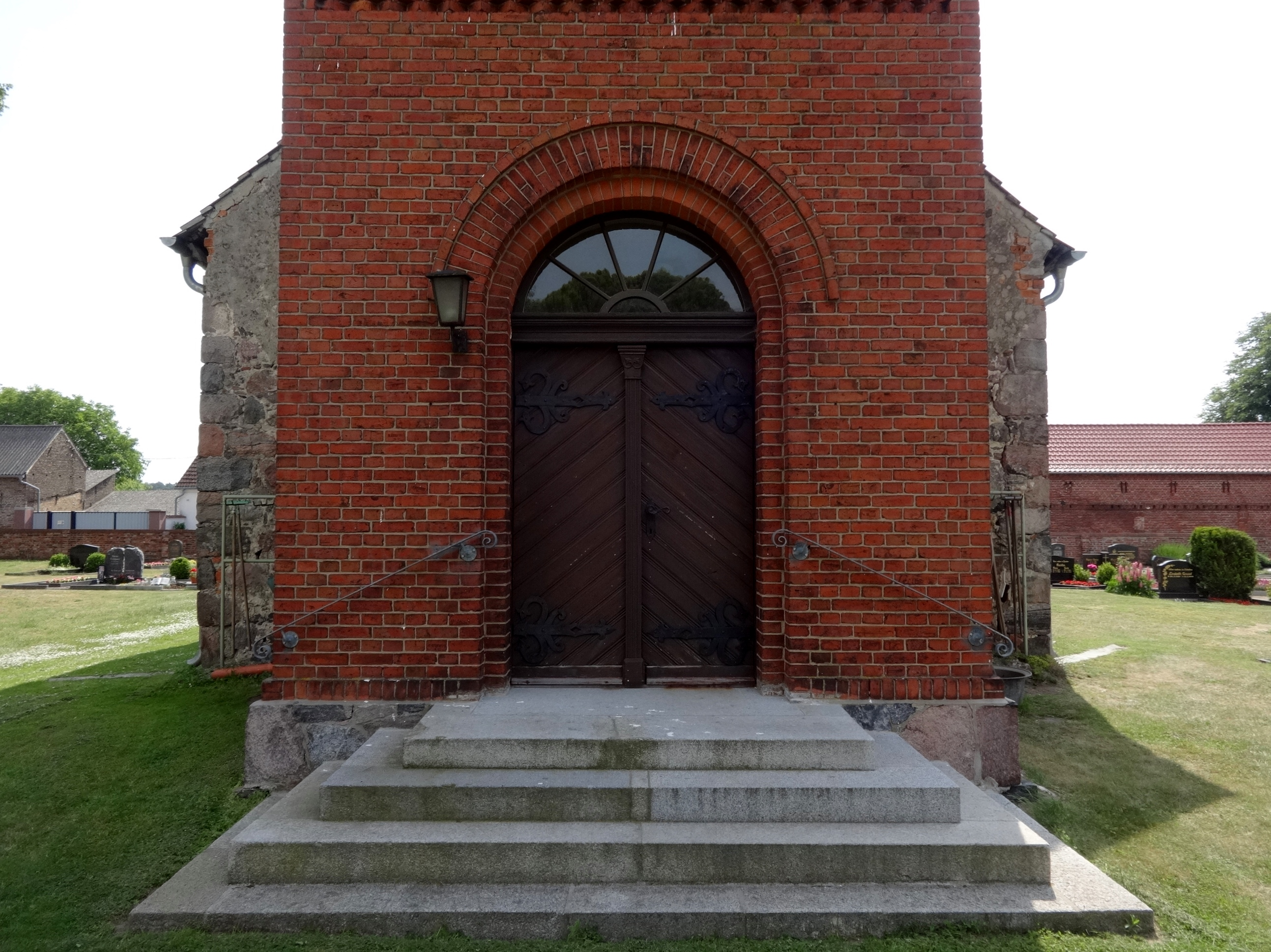 Die Feldsteinkirche wurde 1459 erstmals urkundlich erwähnt. Untersuchungen ergaben jedoch, dass sie auf einen Vorgängerbau aus dem 13. Jahrhundert errichtet wurde. Im Innern befinden sich ein Kanzelaltar aus dem Jahr 1726 sowie eine Süd- und Ostempore aus dem 18. Jahrhundert.